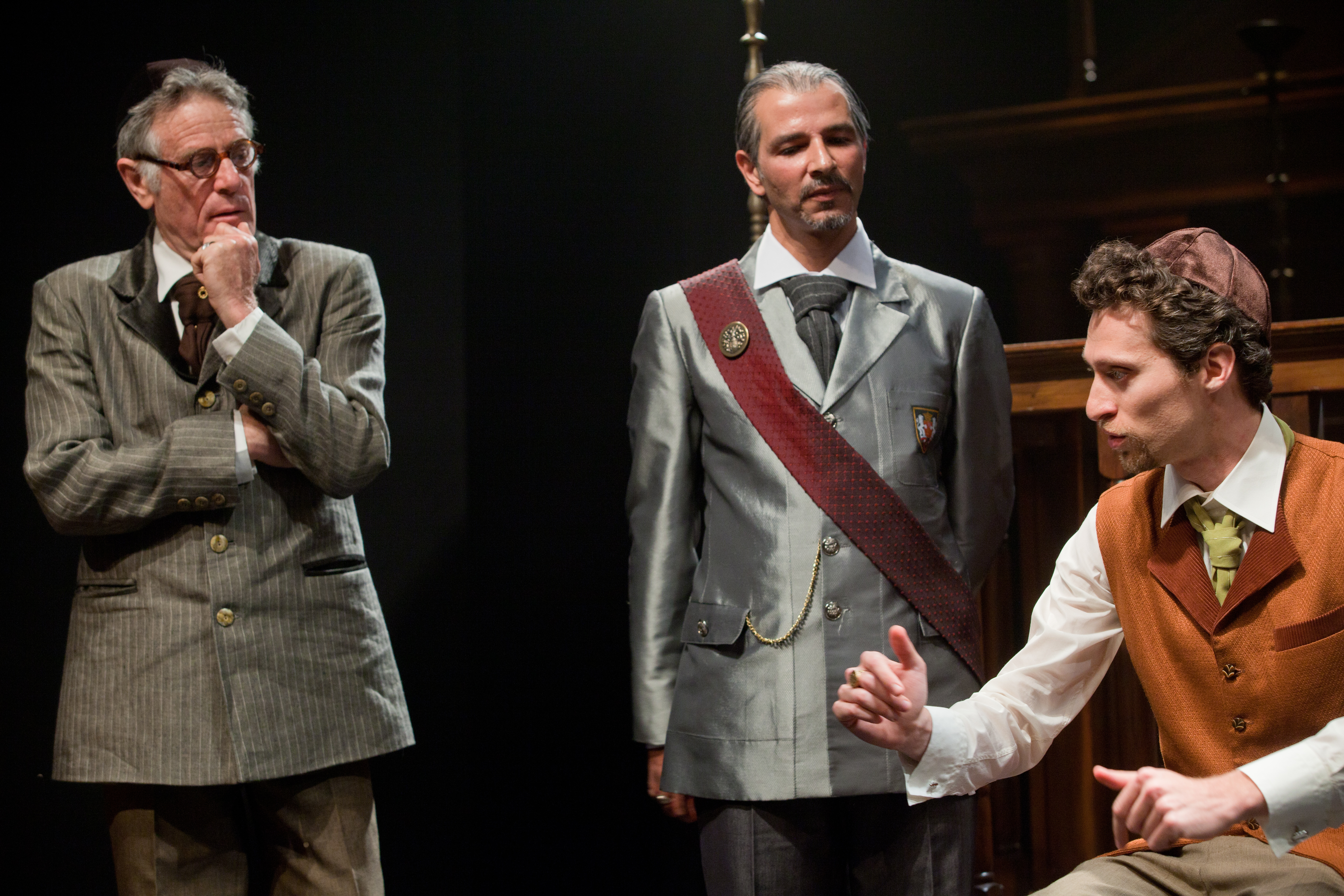 ויטלי פרידלנד, יוסי עיני ואבי פניני בהצגה "ירושלים החדשה", בבימויו של סיני פתר, תיאטרון החאן, 2012